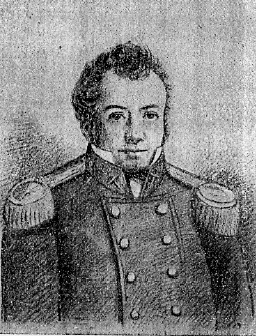 Retrato a lápiz del Coronel Leonardo Rosales.